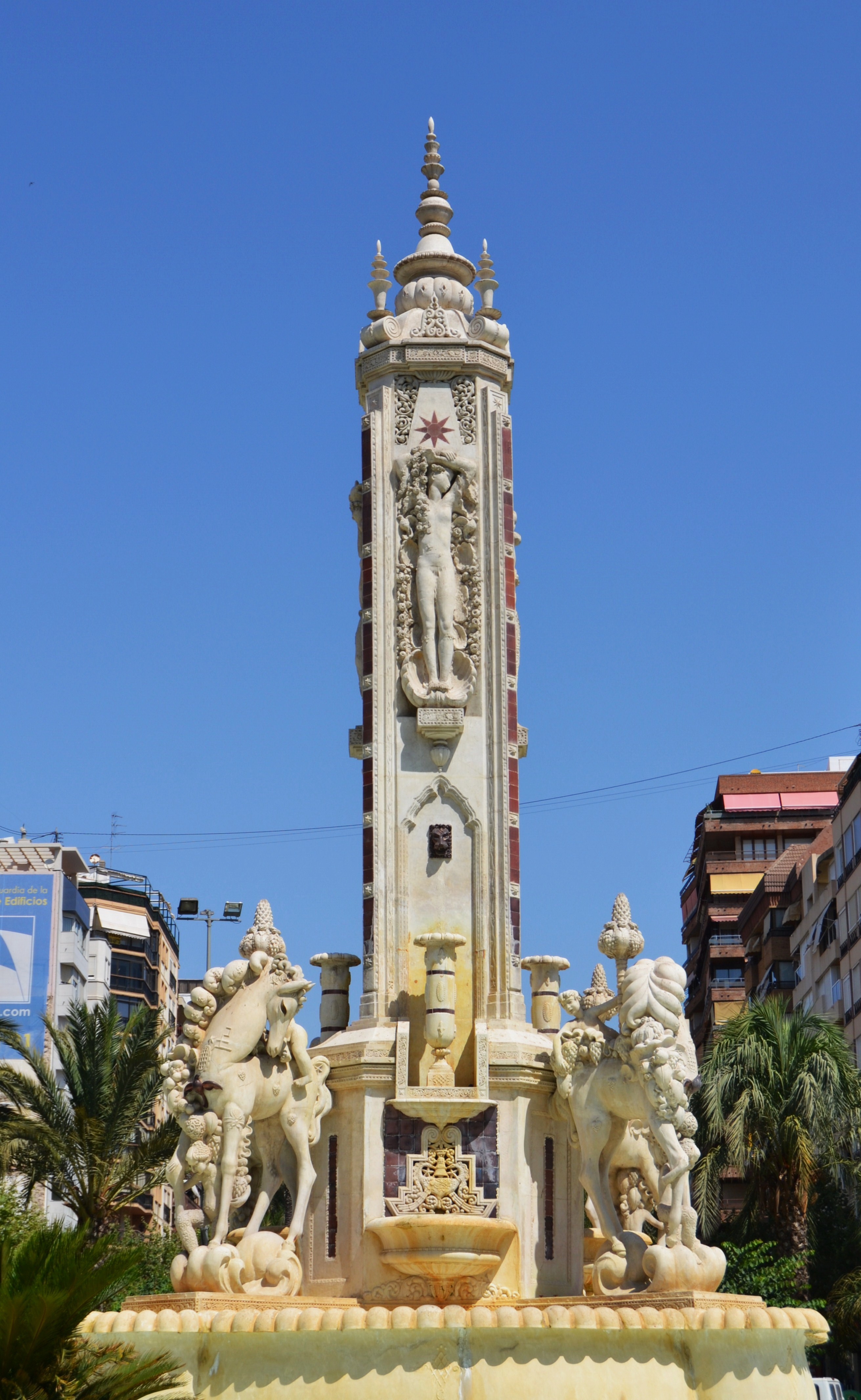 Alacant, font de Llevant, plaça dels Estels.